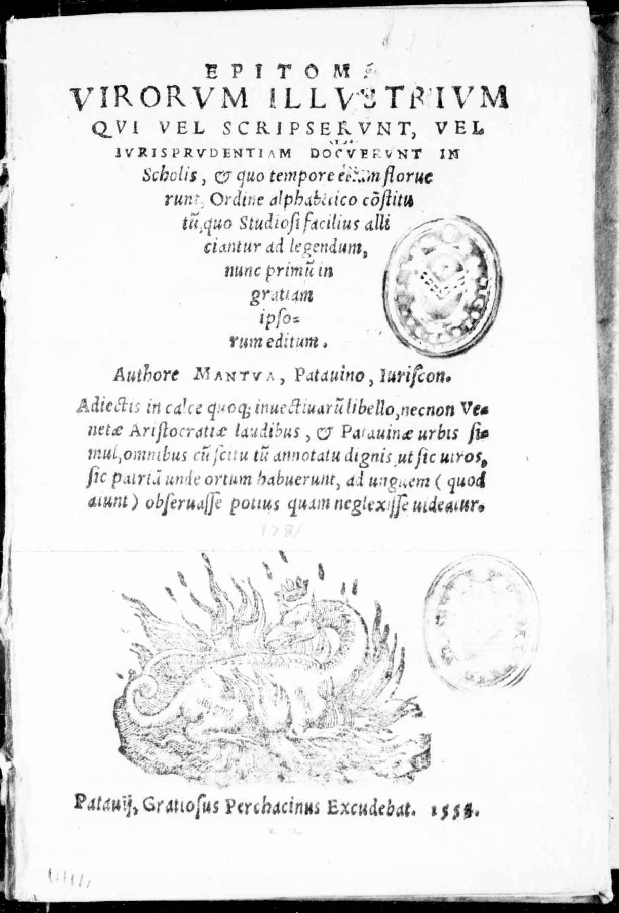 Frontespizio